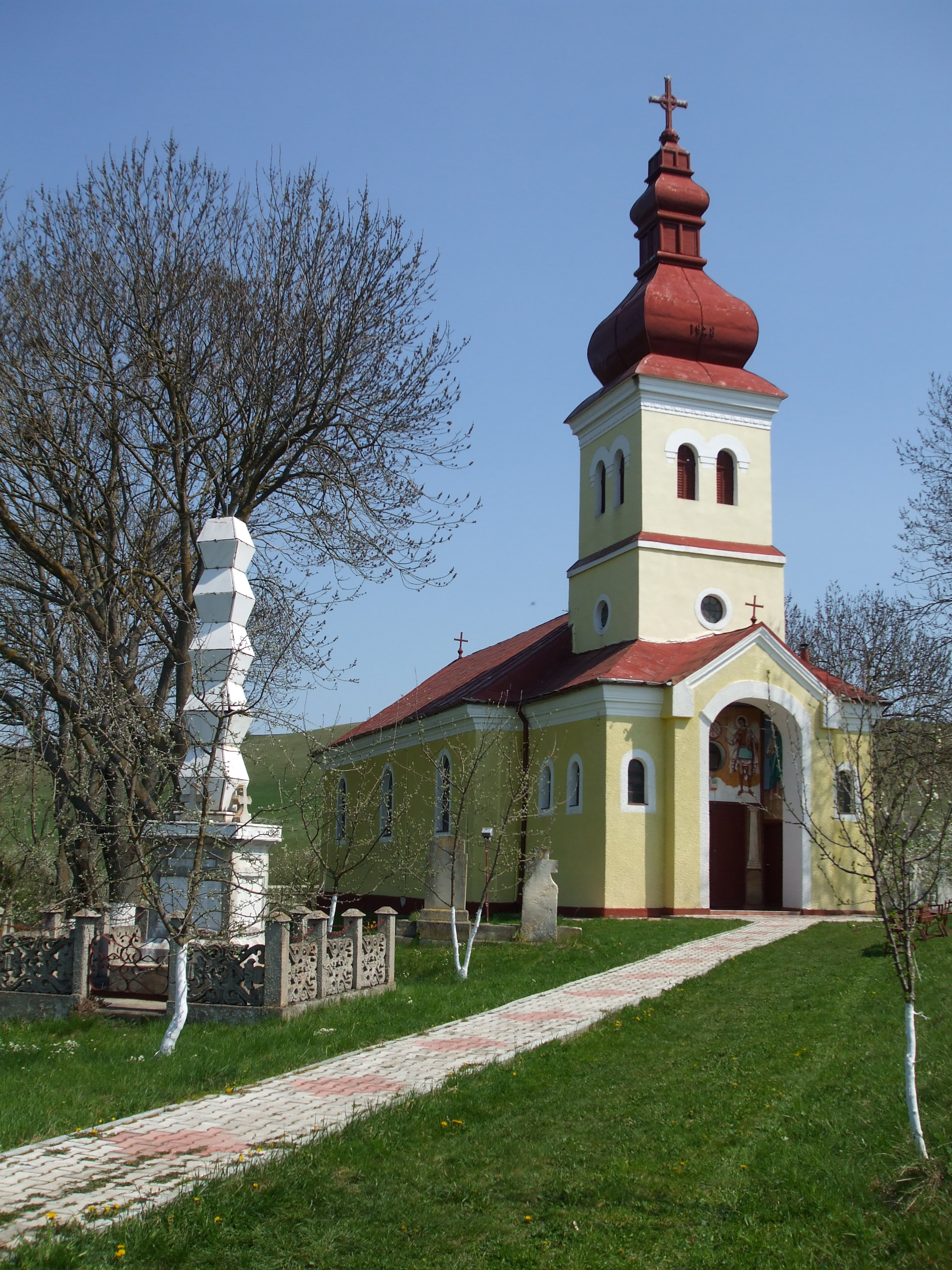 Biserica din Aruncuta, jud.Cluj -construita in anul 1928